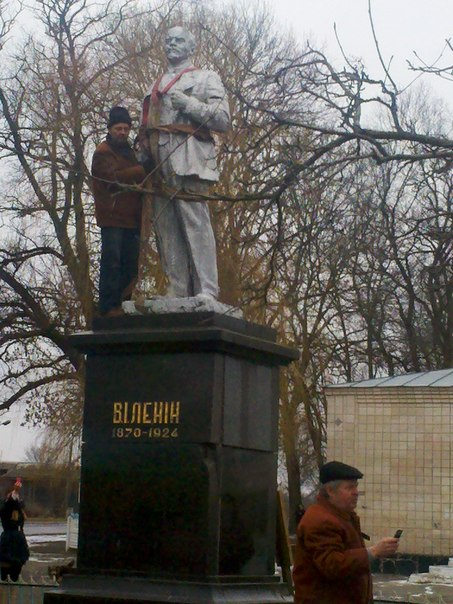 Знесення Леніна у Вільску